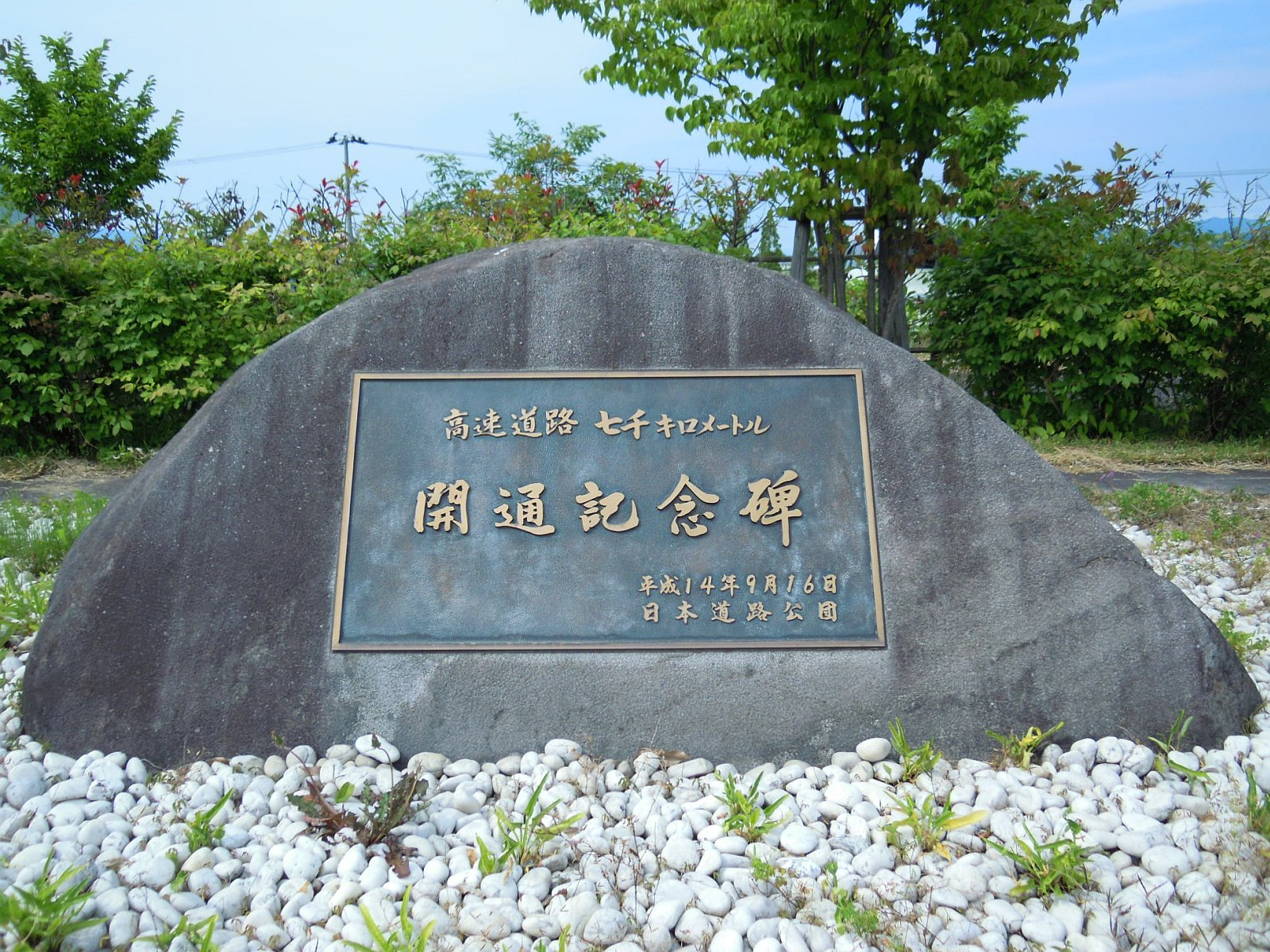 東北中央自動車道山形中央インターチェンジ料金所横にある高速道路開通7,000km記念碑